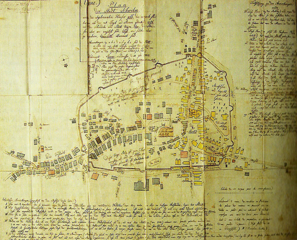 Karte der Stadt Schwelm im Jahre 1722